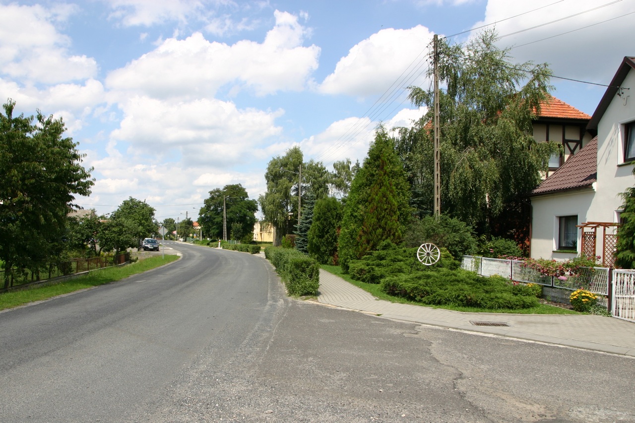 Łącznik (dodatkowa nazwa w j. niem. Lonschnik) – wieś w Polsce położona w województwie opolskim, w powiecie prudnickim, w gminie Biała.